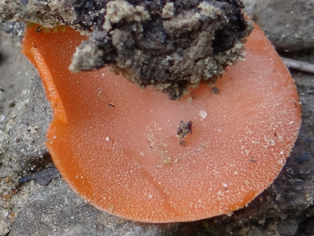 Aleuria aurantia (location: Poland, Beskid Żywiecki, Babia Góra)